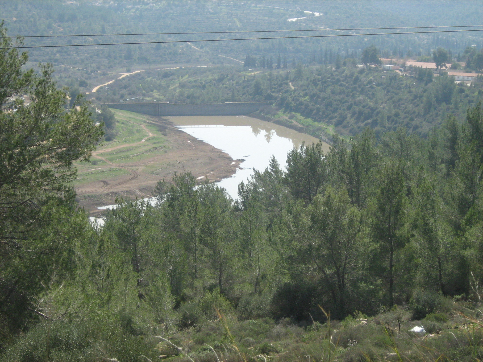 מאגר בית זית פברואר 2009